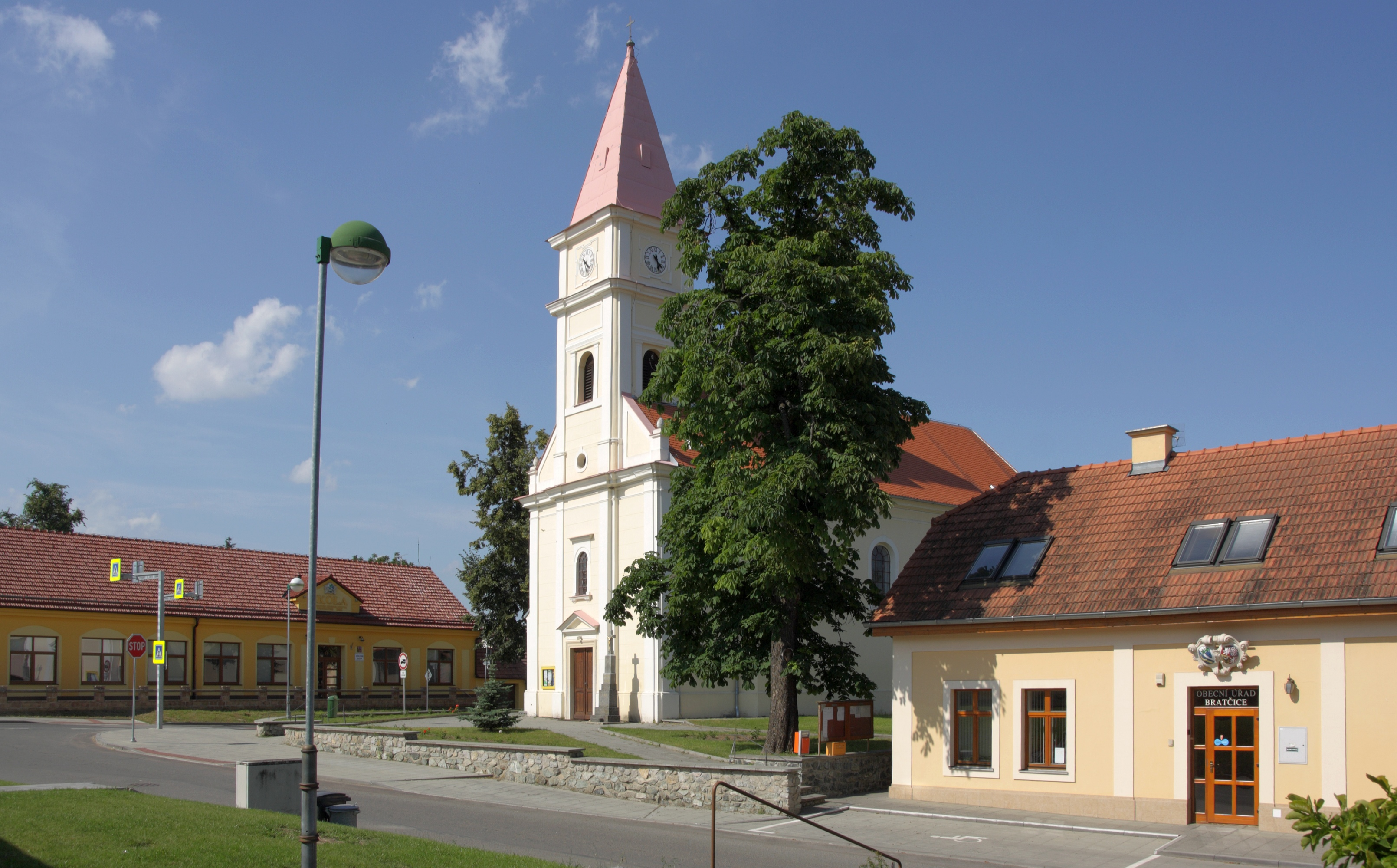 Bratčice - centrum obce s kostelem Nejsvětější Trojice.